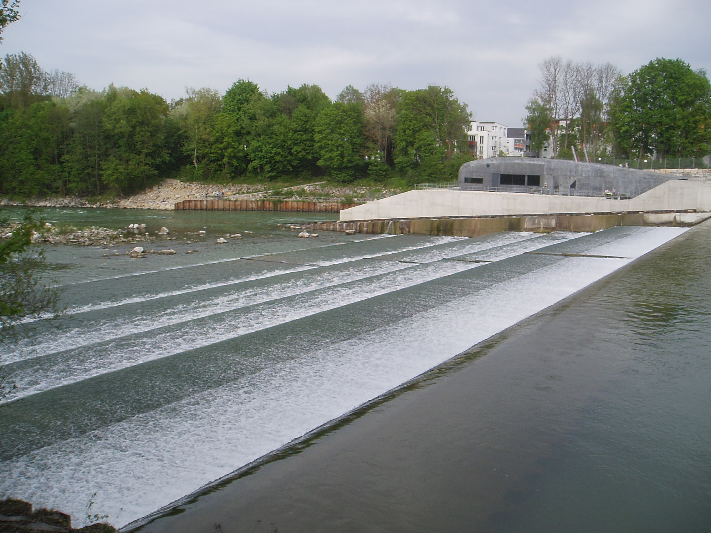 Eisenbahnerwehr am Lech in Augsburg, Nordost-Richtung